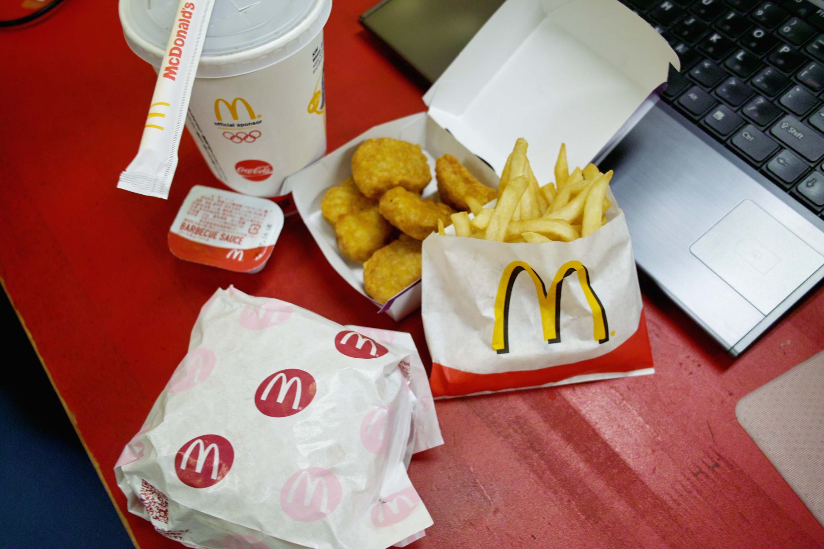 本日のお昼ご飯。てりたま。